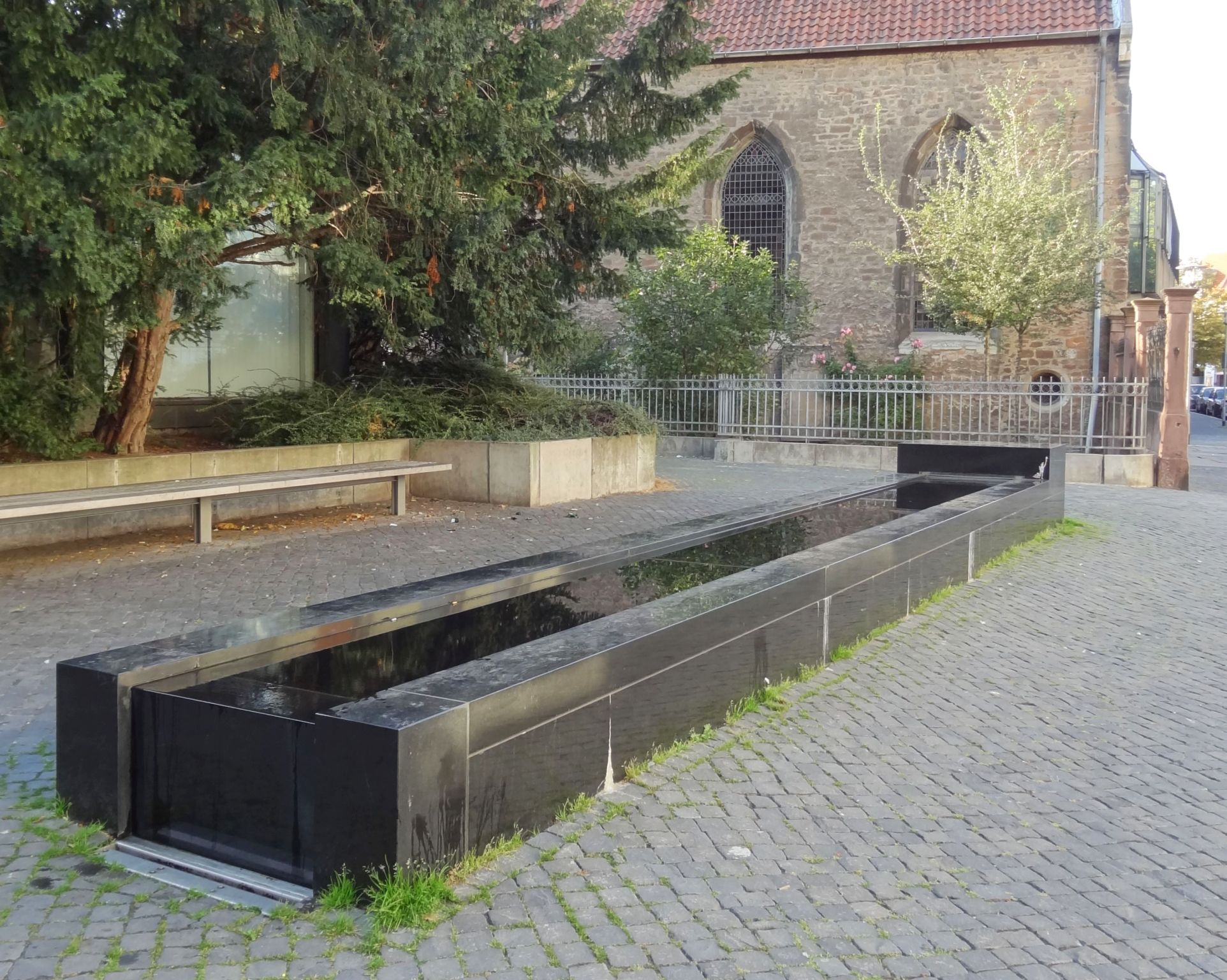 Brunnen an der Schützenstraße, Braunschweig